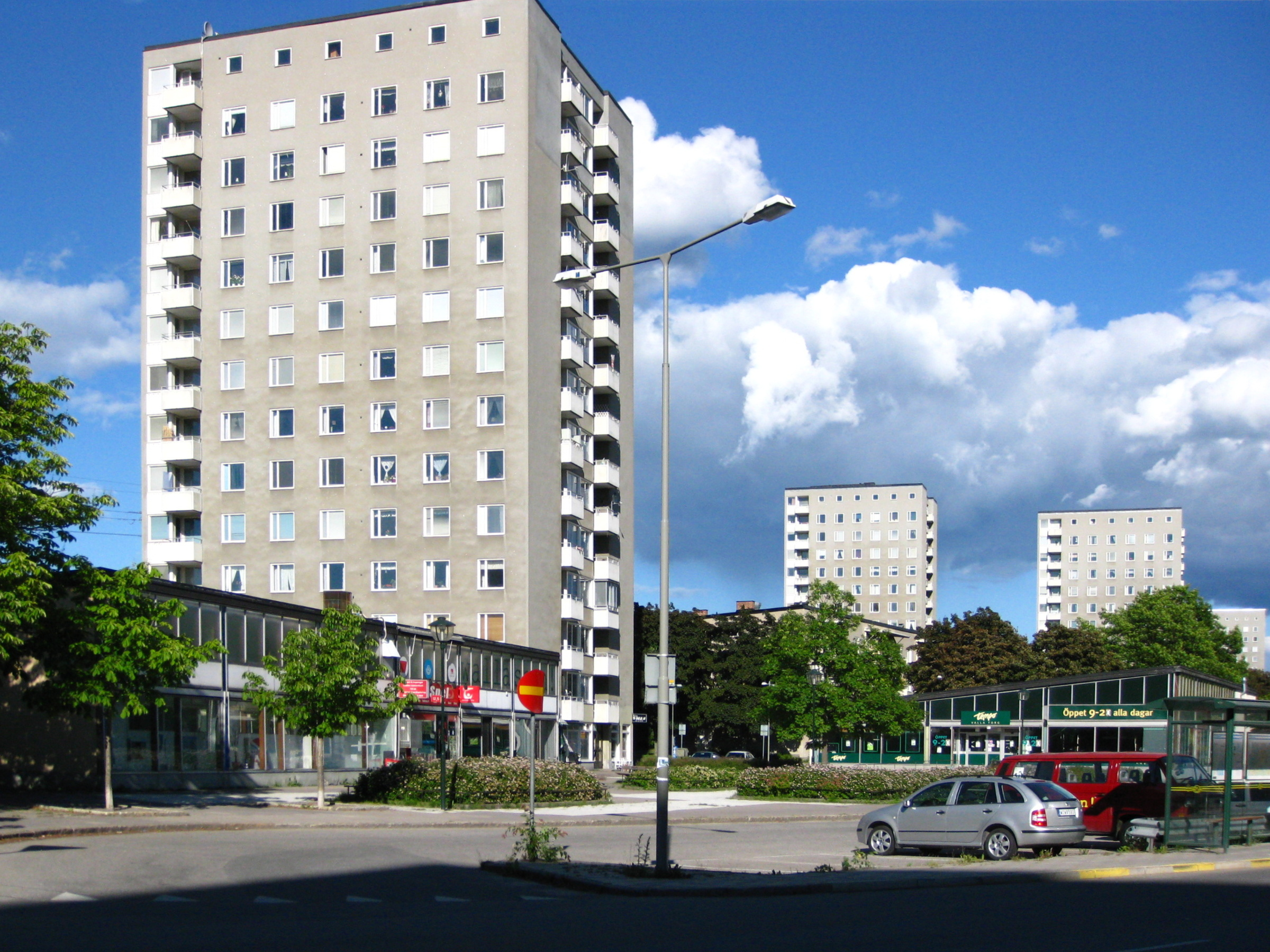 Valla torg, Årsta, Stockholm